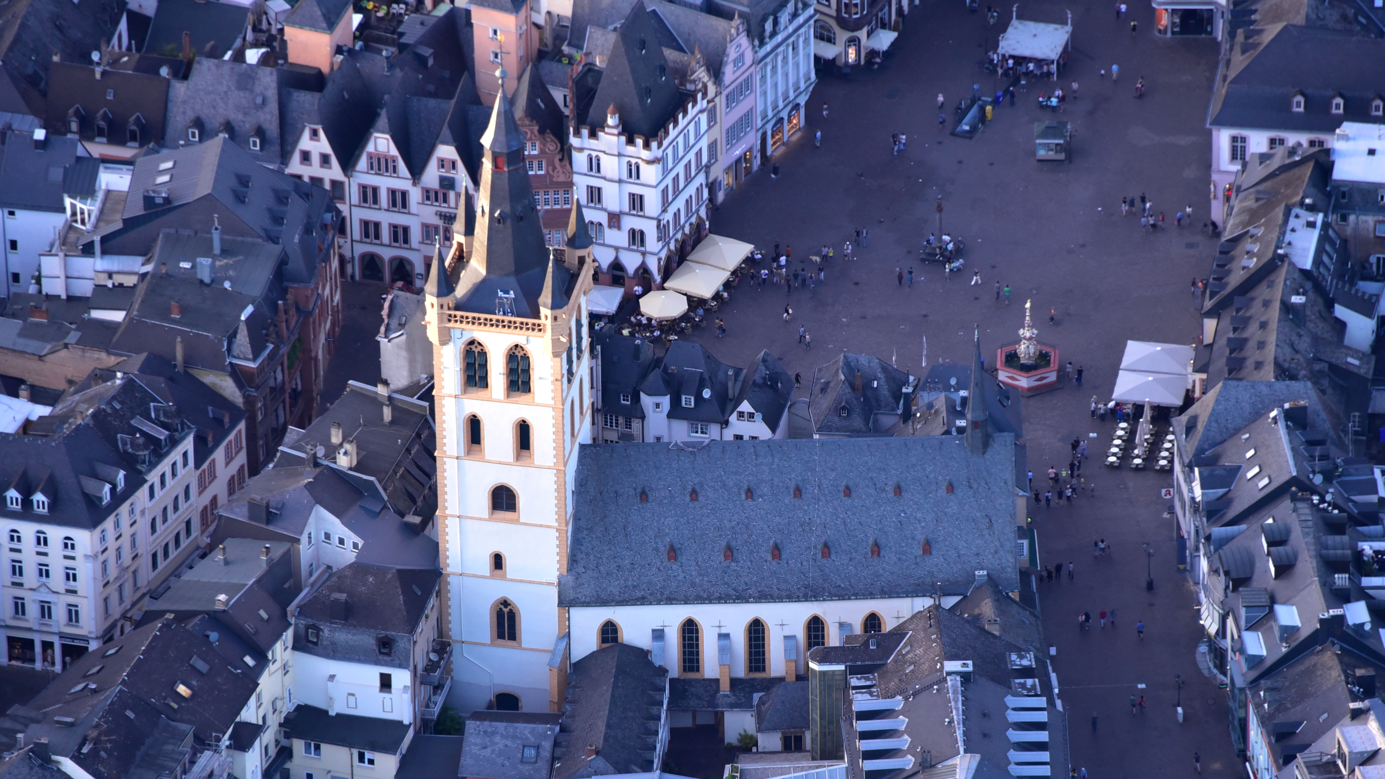 Trier, St. Gangolf, Luftaufnahme (2016)